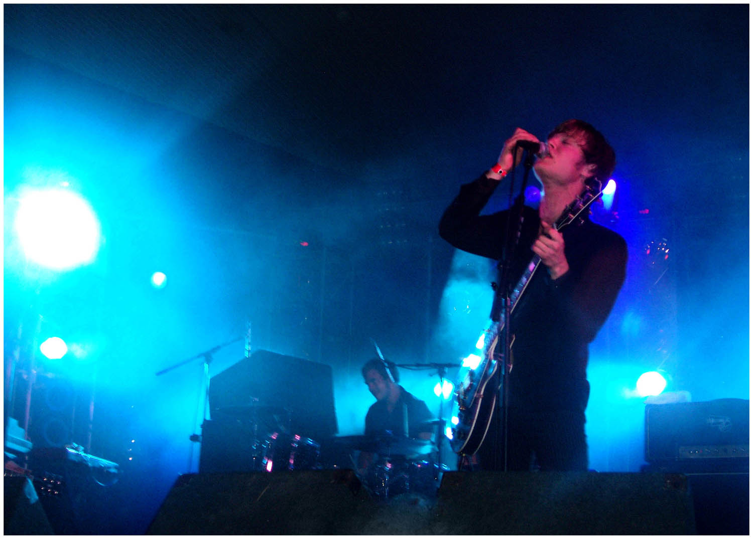 Björn Dixgård på storsjöyran 2006.